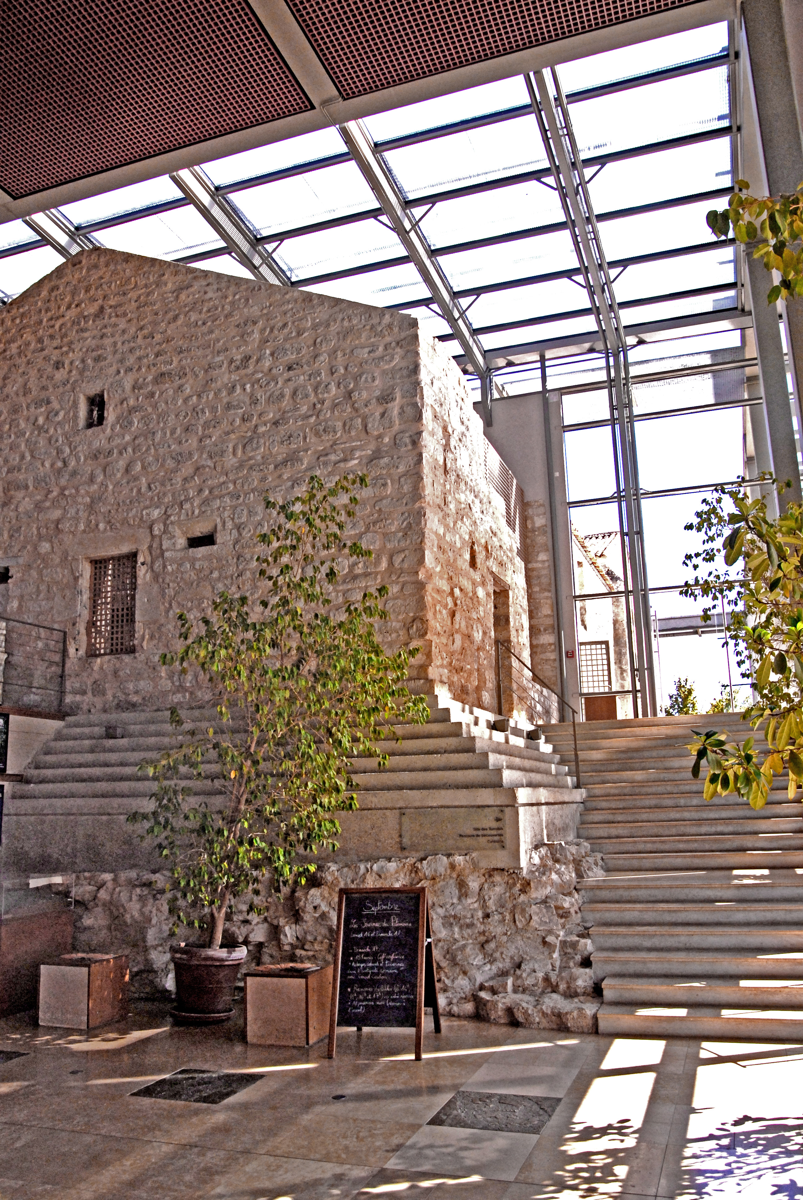 In Neubau integrierte Altbauten